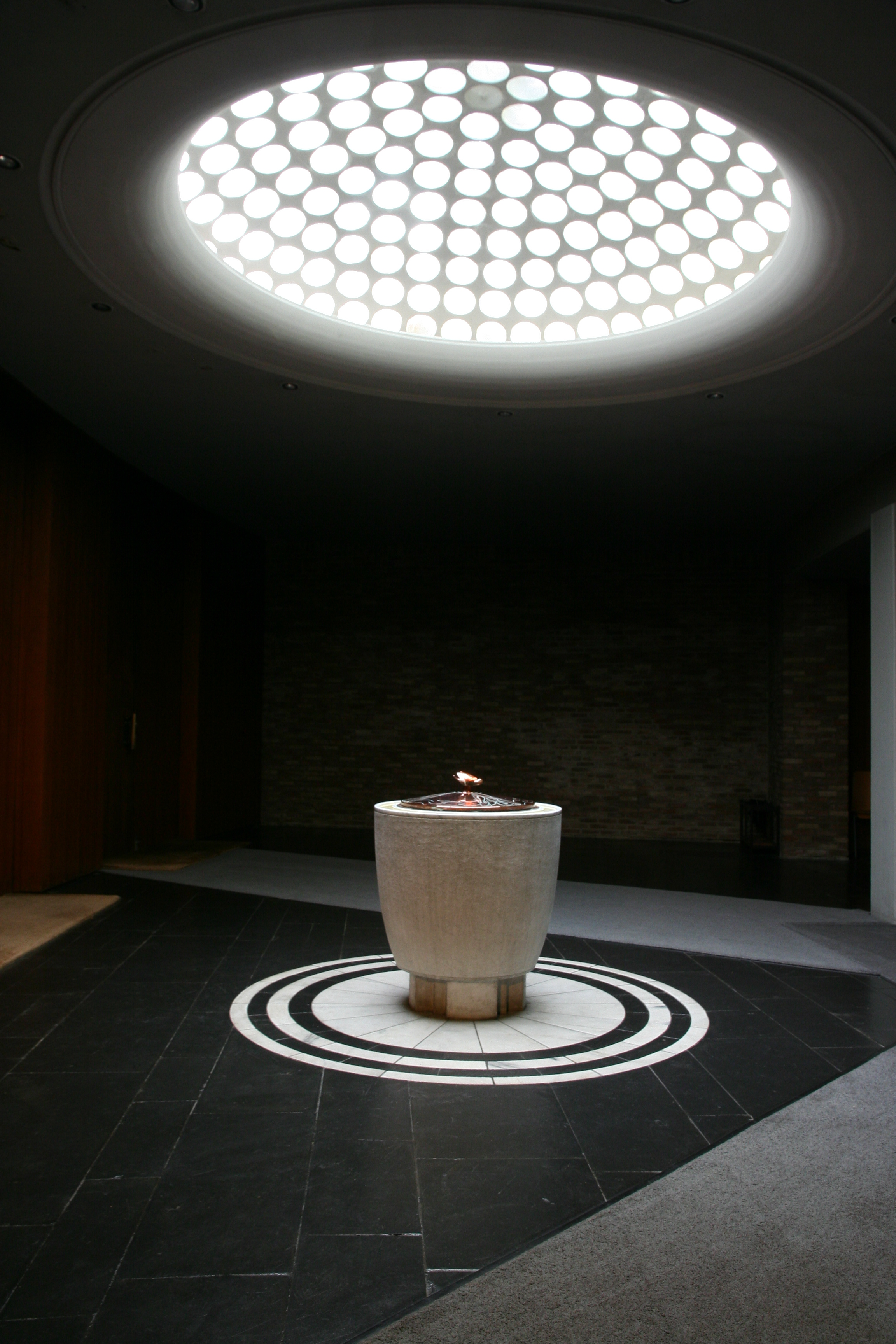 Römisch-katholische Pfarrkirche St. Josef Baden-Baden